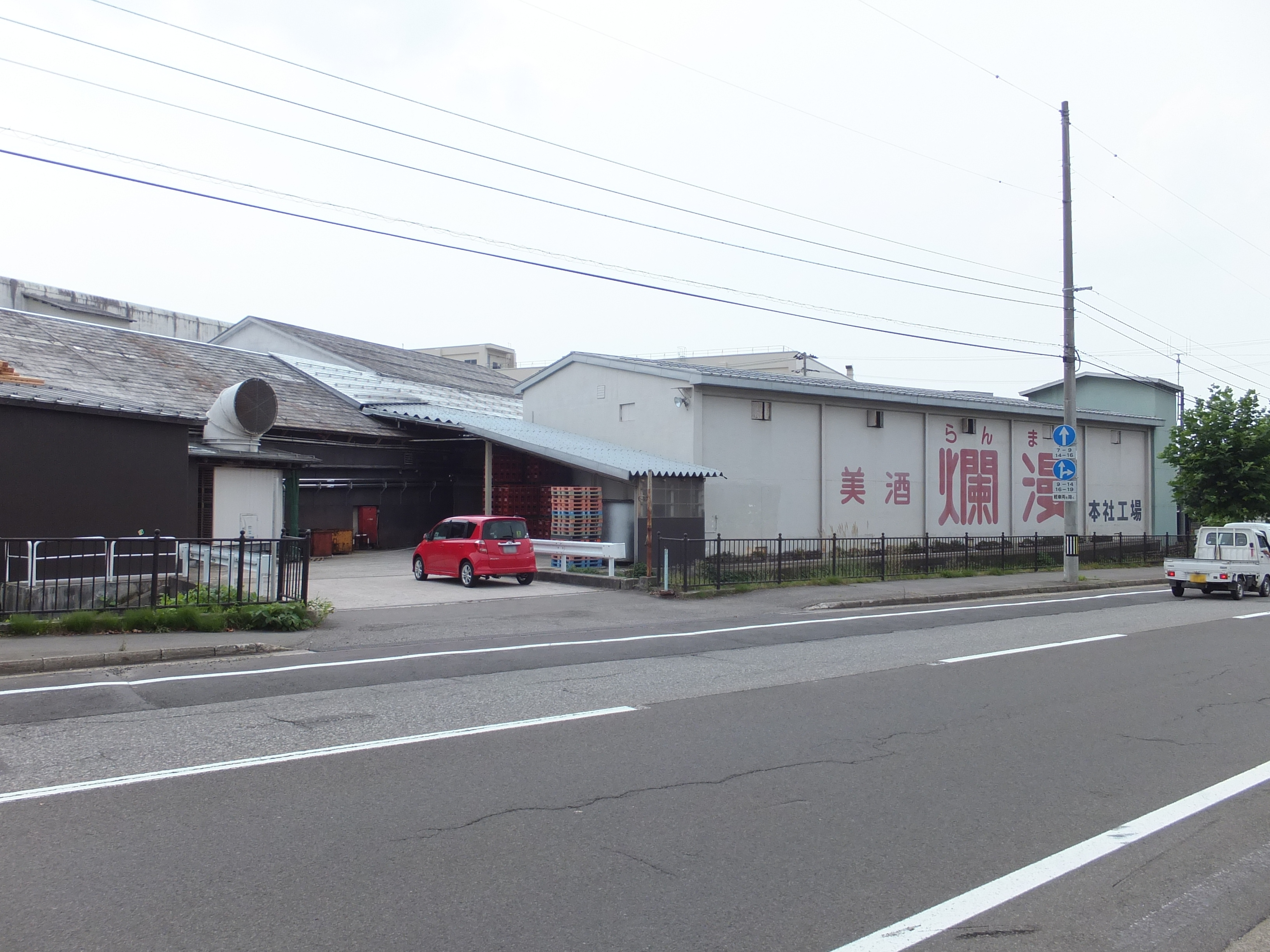 秋田銘醸・本社工場